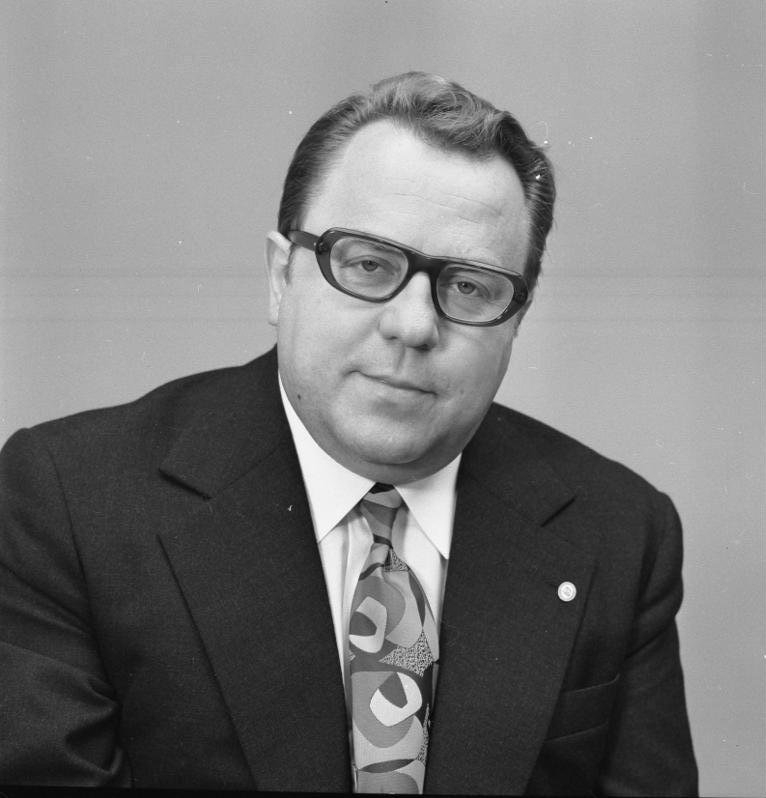 Michael Kohl Dr. Michael Kohl Leiter der Ständigen Vertretung der DDR in der BRD. Außerordentlicher und Bevollmächtigter Botschafter. [Michael Kohl (Porträt)] Abgebildete Personen: Kohl, Michael Dr.: Leiter der Ständigen Vertretung in der Bundesrepublik Deutschland, DDR